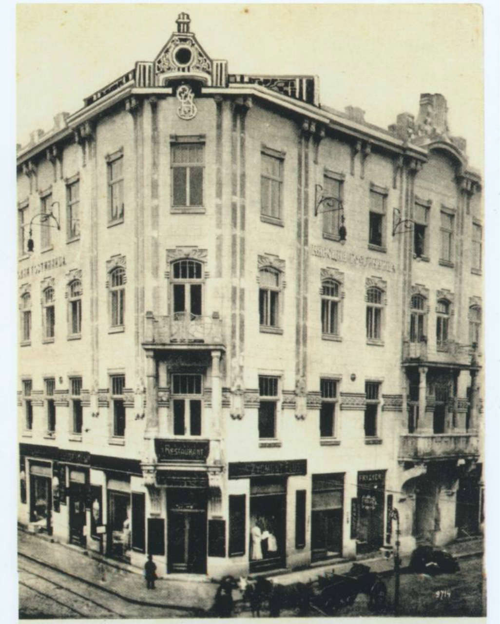 Народна гостинниця